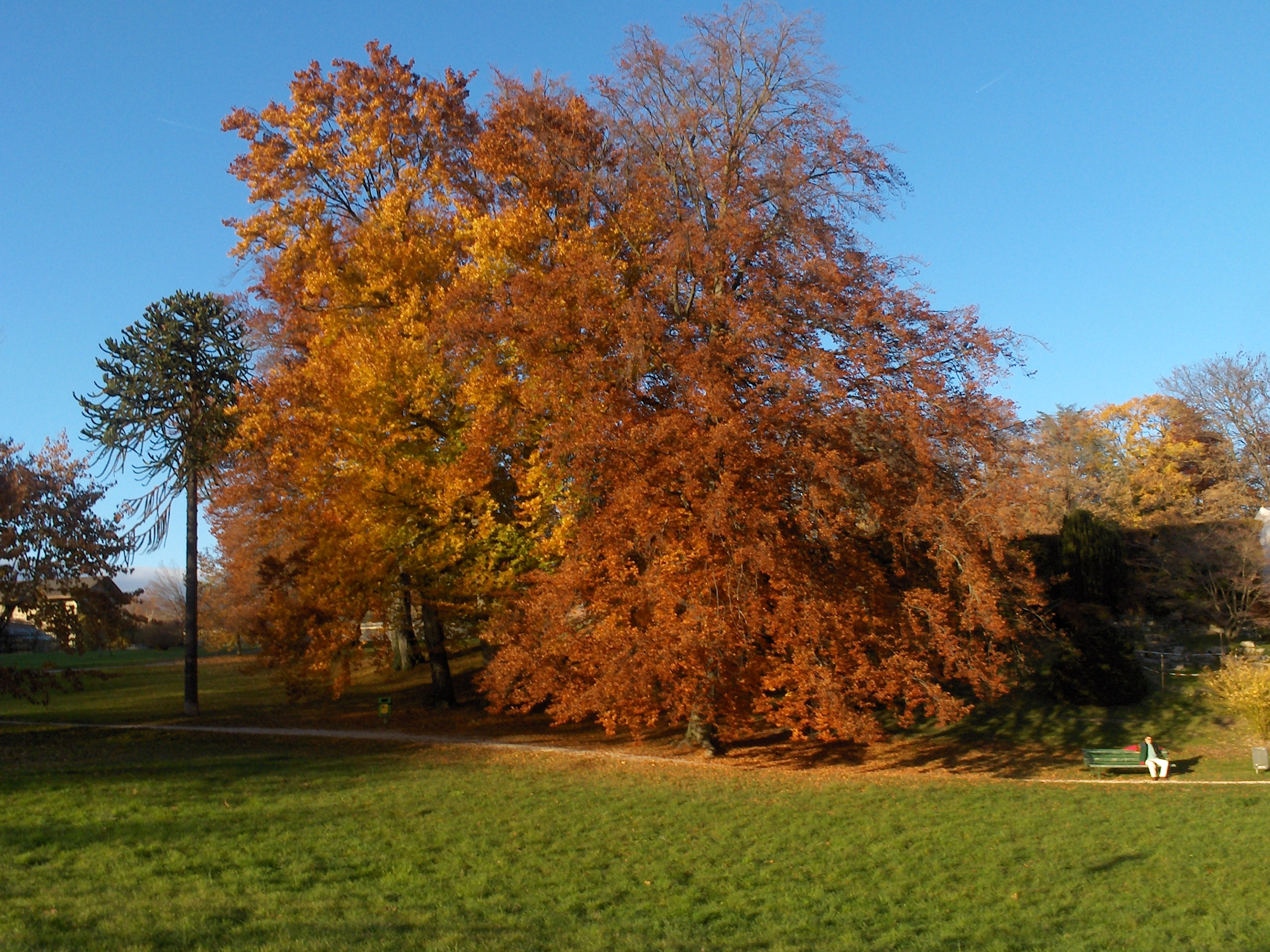 Château de Penthes - Genève